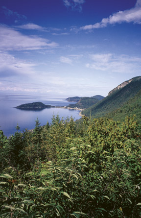 Paysage maritime / Maritime Landscape, Bas-St-Laurent (Saint-Fabien), Québec (Canada)